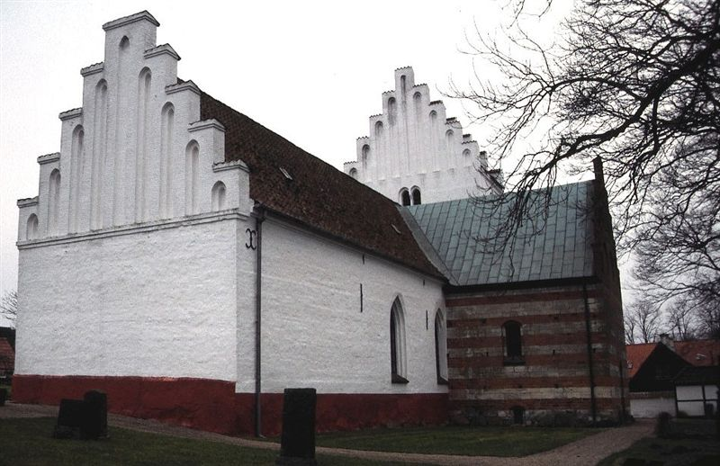 Bråby Kirke i Danmark. Bråby kirke